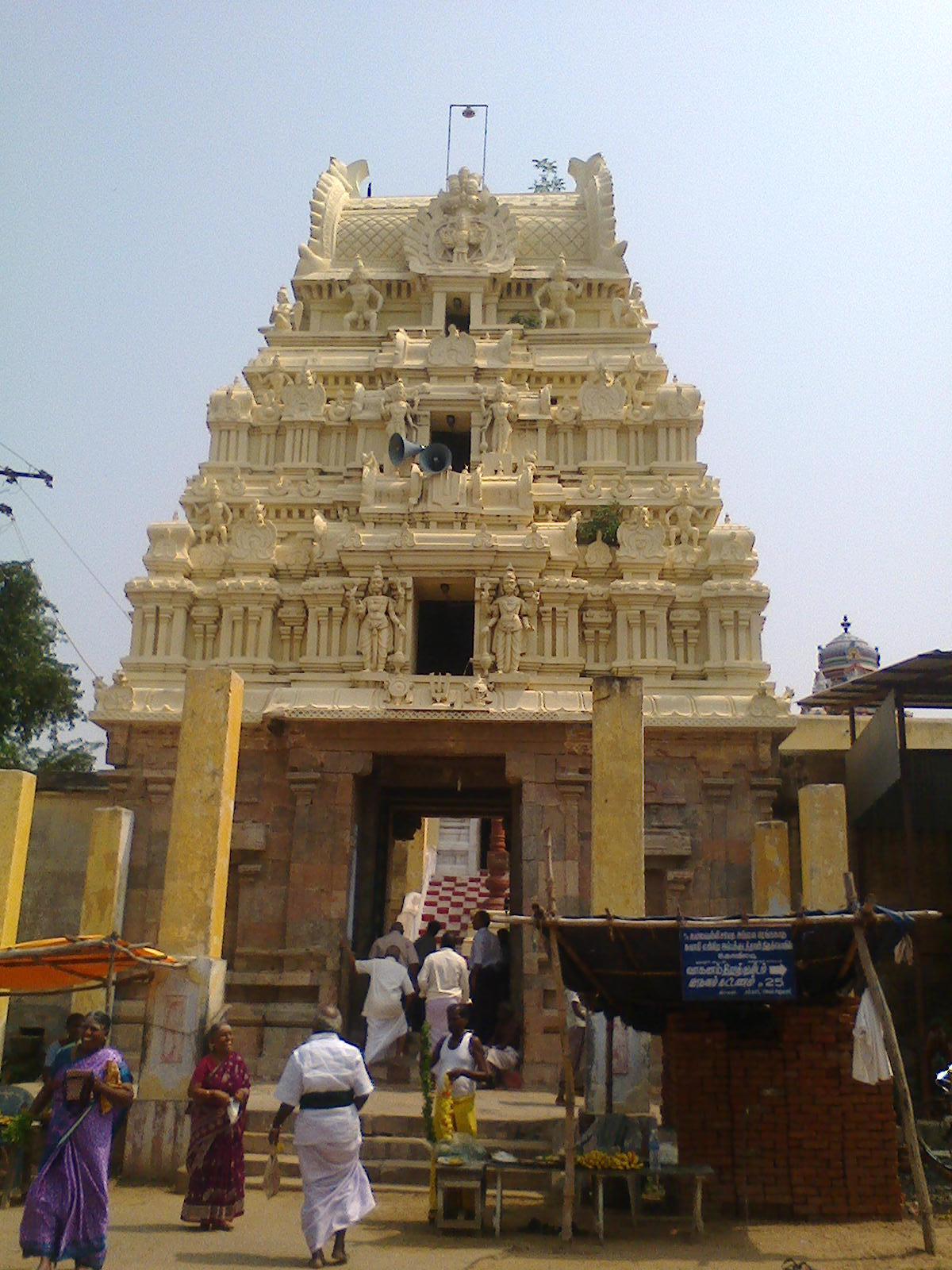 கோவிலடி என்னும் திருப்பேர் நகர் அப்பாலரெங்கநாதர் கோயில்